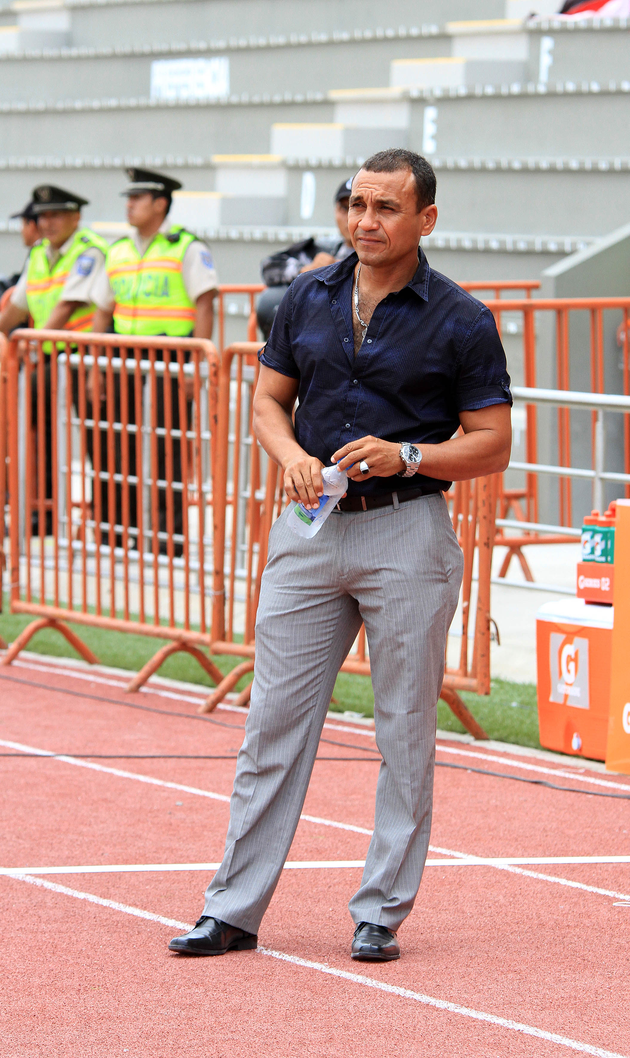 Guayaquil, sábado 31 de enero del 2015 (ANDES).-Humberto Pizarro DTR. de River Plate de Ecuador en el partido que enfrentó al Aucas en la primera fecha de la serie A del campeonato ecuatoriano de fútbol Foto:César Muñoz/ANDES